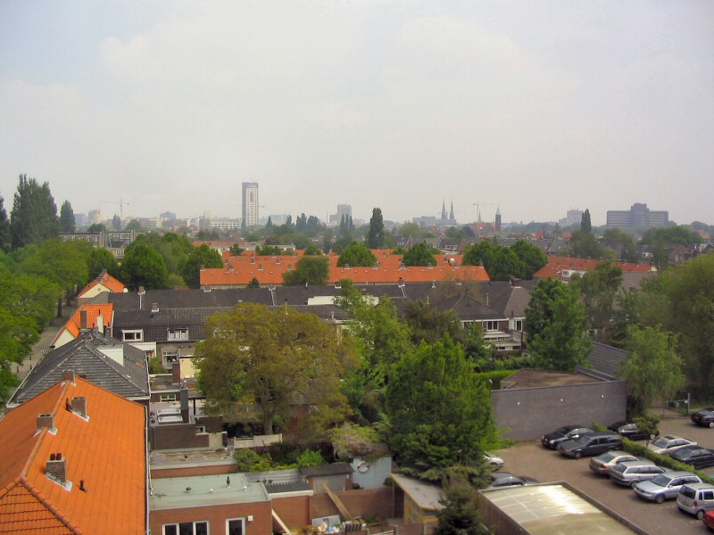 Skyline of Eindhoven